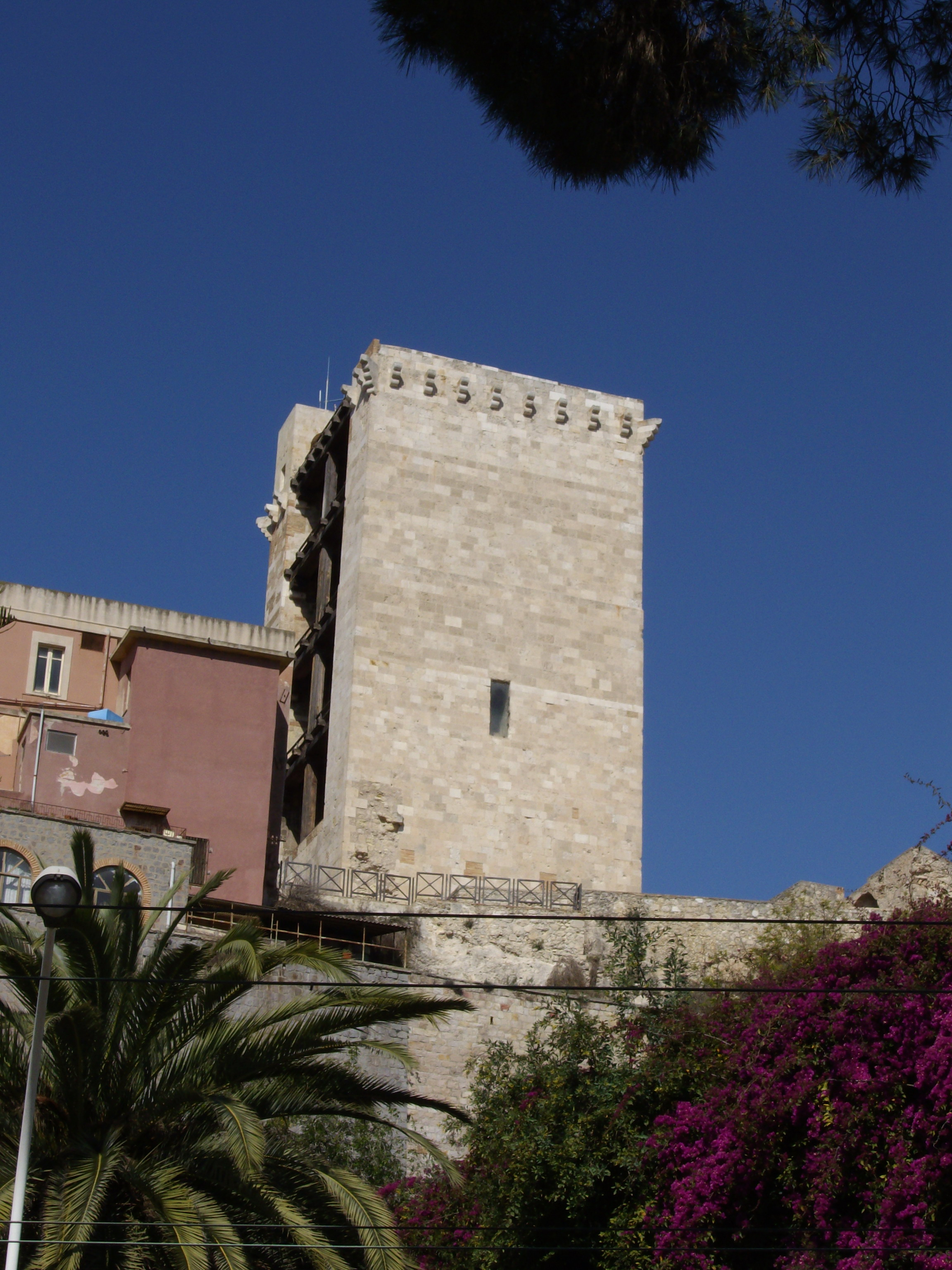 Torre di San Pancrazio (XIV secolo) a Cagliari